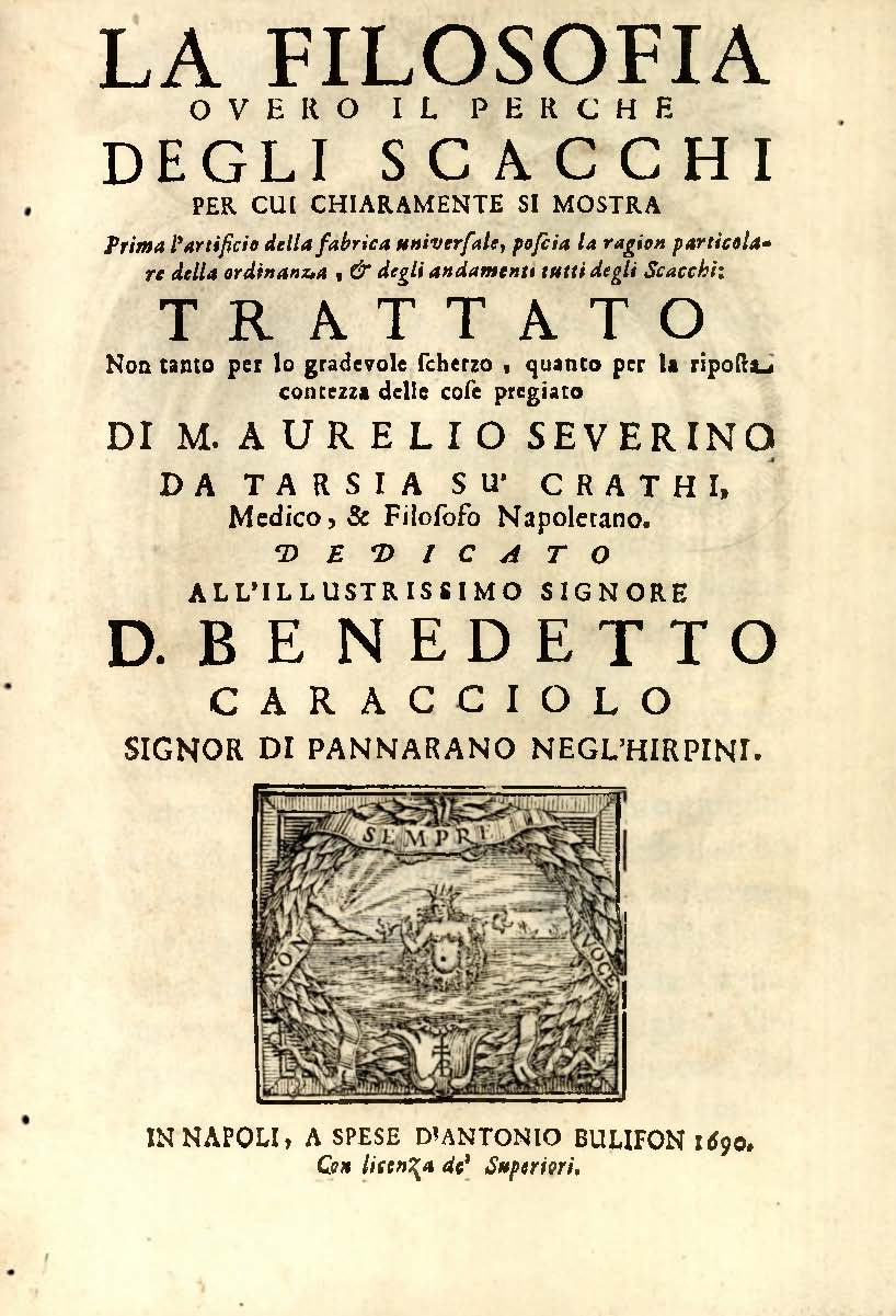 La filosofia overo il perche degli scacchi per cui chiaramente si mostra prima l'artificio della fabrica universale, poscia la ragion particolare della ordinanza, & degli andamenti tutti degli scacchi: trattato non tanto per lo gradevole scherzo, quanto per la riposta contezza delle cose pregiato di M. Aurelio Severino da Tarsia su' Crathi, Medico, & Filosofo Napoletano. Dedicato all'illustrissimo signore D. Benedetto Caracciolo, Signor di Pannarano negl'Hirpini